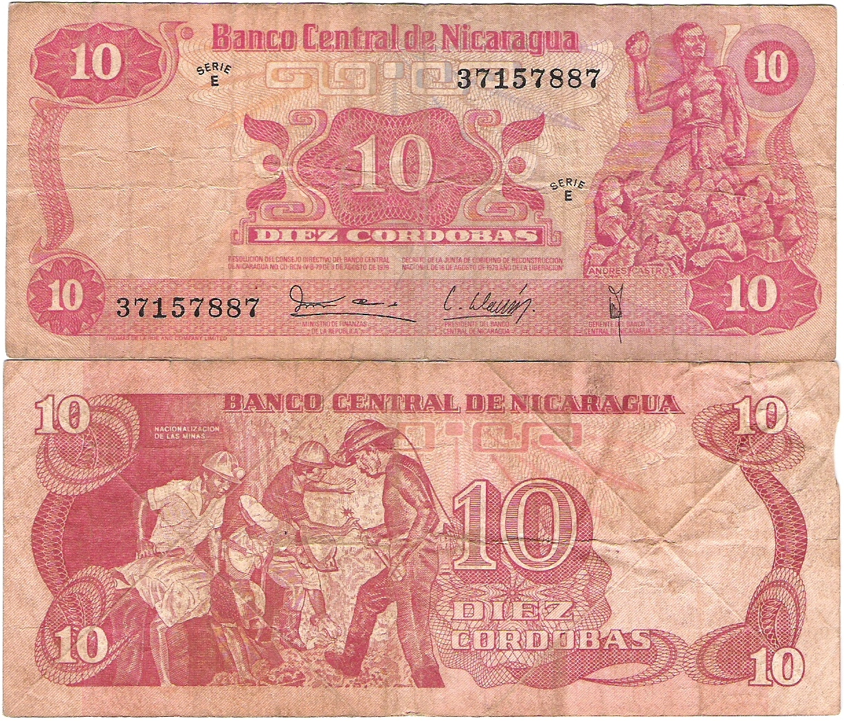 C$10 córdobas showing Andres Castro. Reverse Nacionalizacion de las minas.